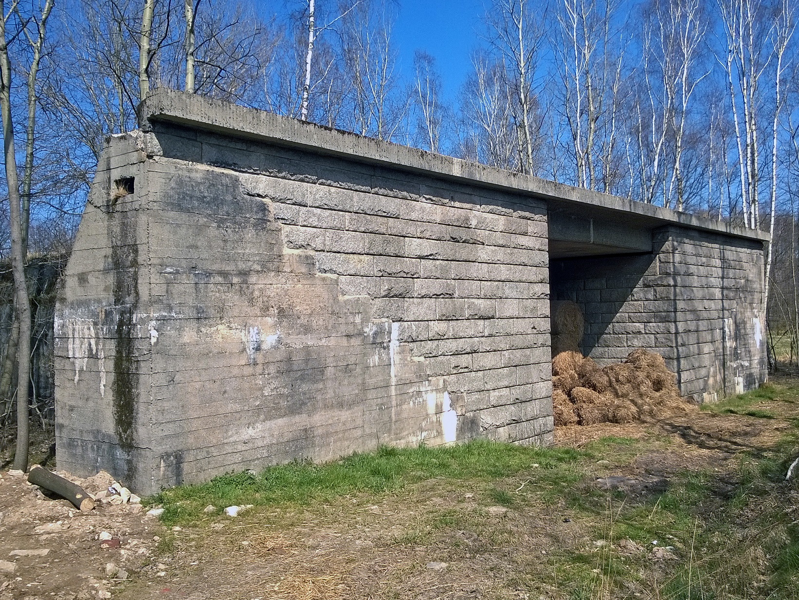 1939/1940 gebaute Autobahnbrücke in Thiemendorf aus der Trassenplanung der 1930er Jahre (in unmittelbarer Nähe des heutigen Verlaufes der Bundesautobahn 4)